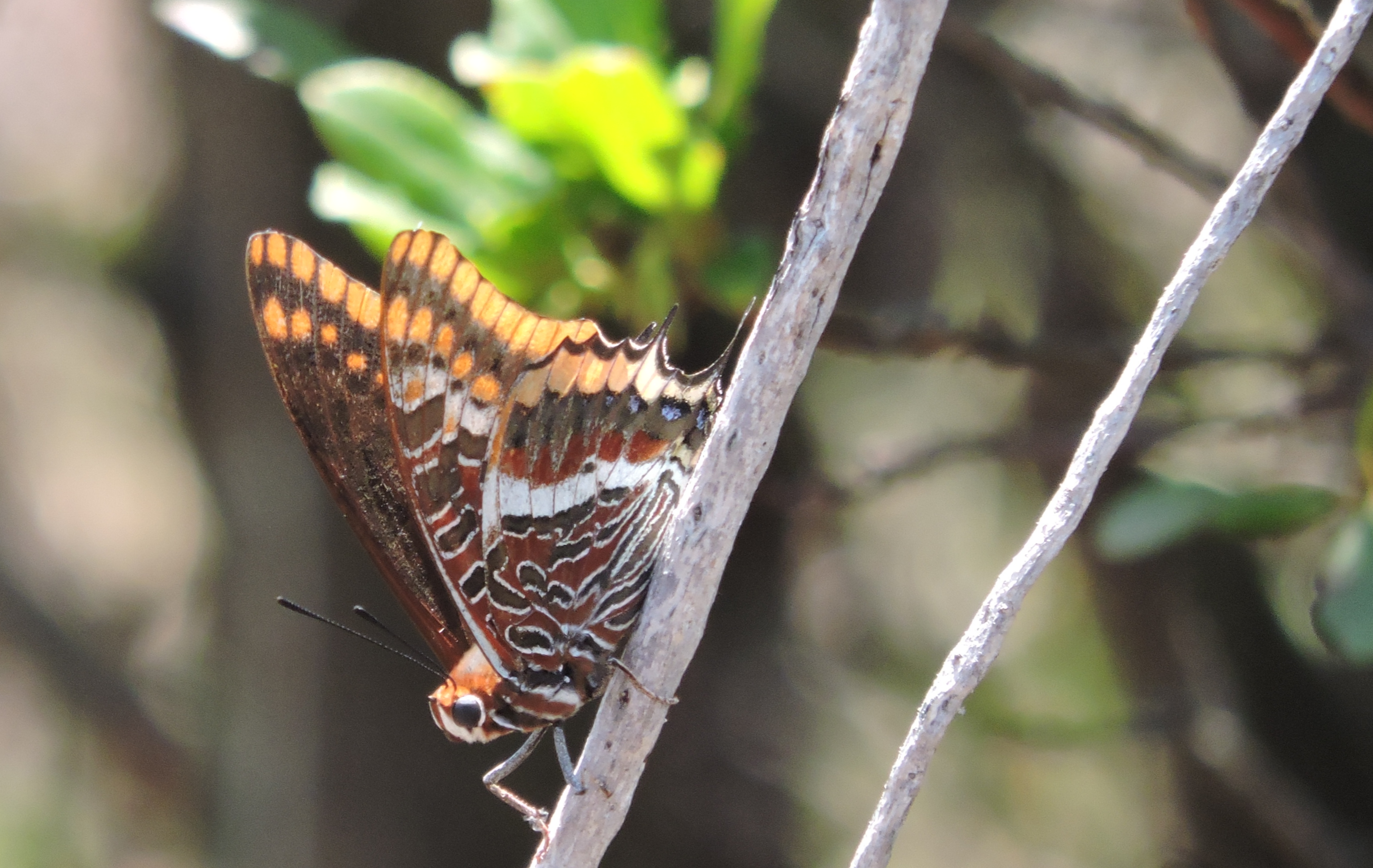 Punta Baffe - Punta Moneglia - Val Petronio (Q55317052)